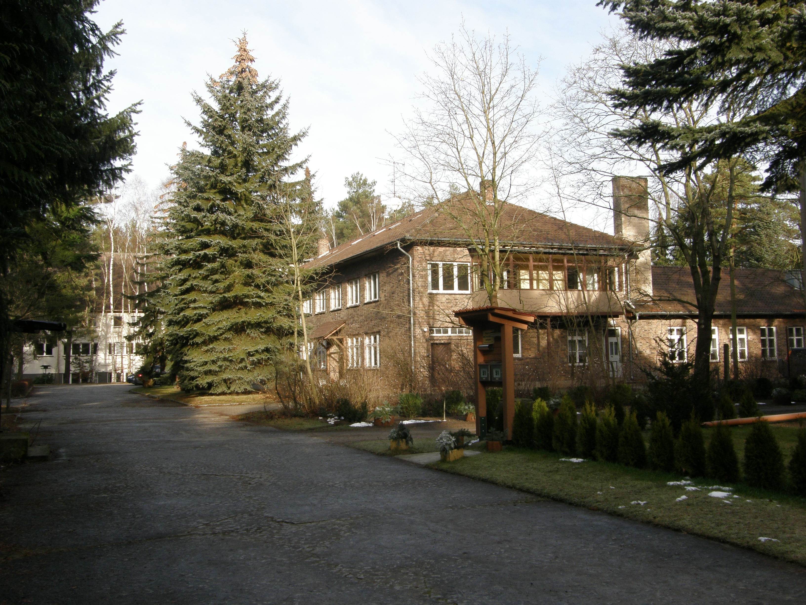 Bernau bei Berlin, Stadtteil Waldfrieden: eh. Forstfachschule (Lanker Str.)